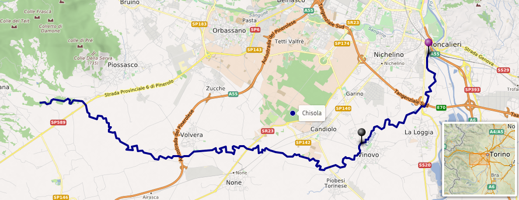 Carte d'après openstreetmap This map may be incomplete, and may contain errors. Don't rely solely on it for navigation.